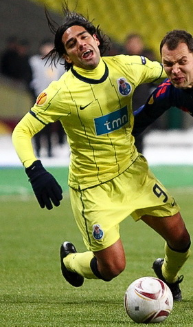 Радамель Фалькао